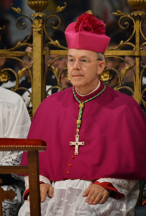 Mgr Schneider, Chartres 2015